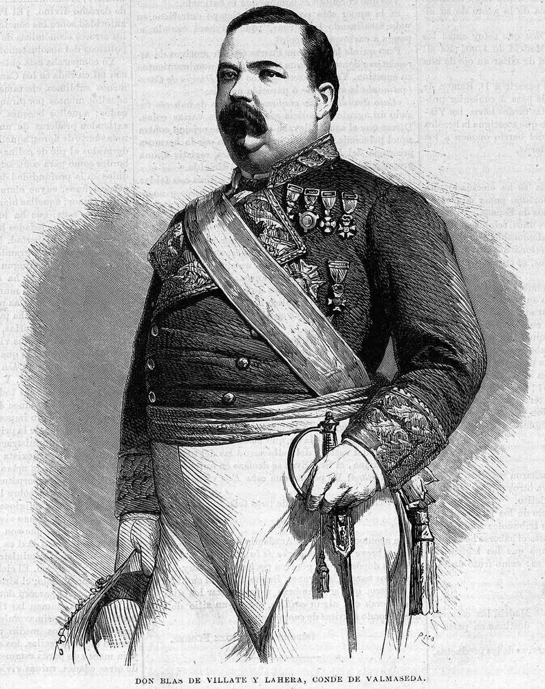 Retrato de Blas de Villate y La Hera, en la revista La Ilustración de Madrid.